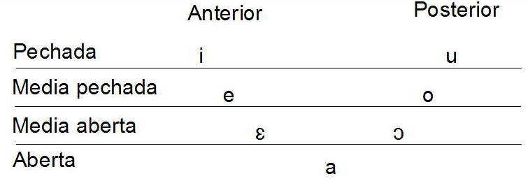 self made